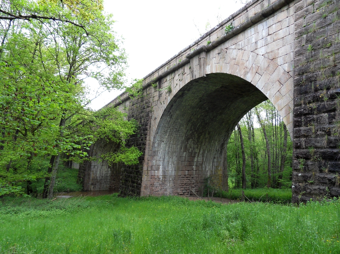 Pont de la vallée (Inscrit)